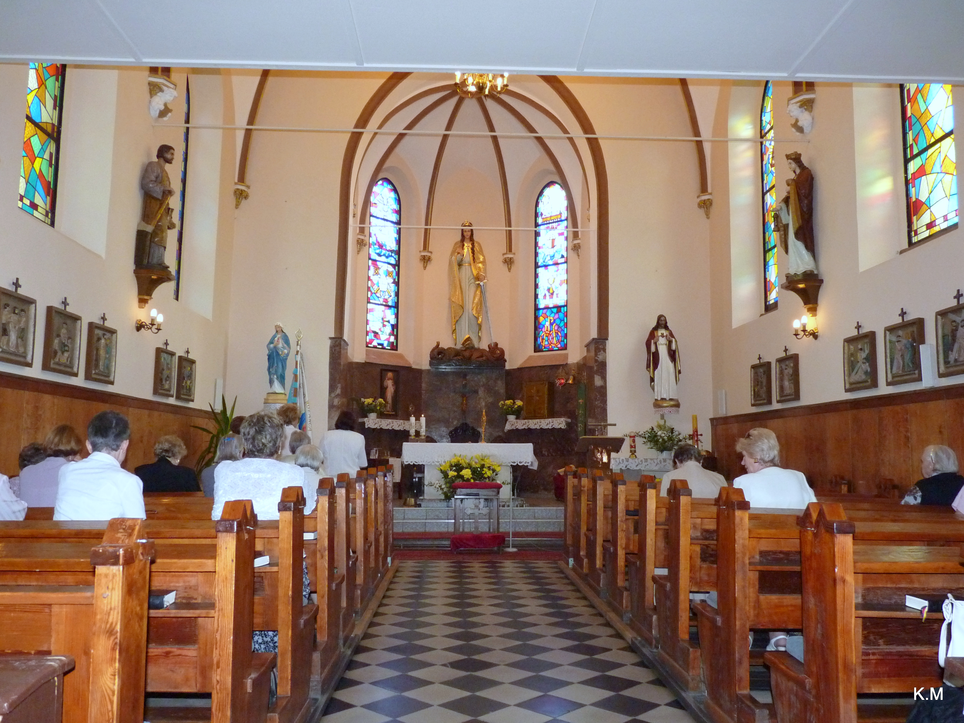 Bytom - widok wnętrza kościoła p.w. Św. Małgorzaty